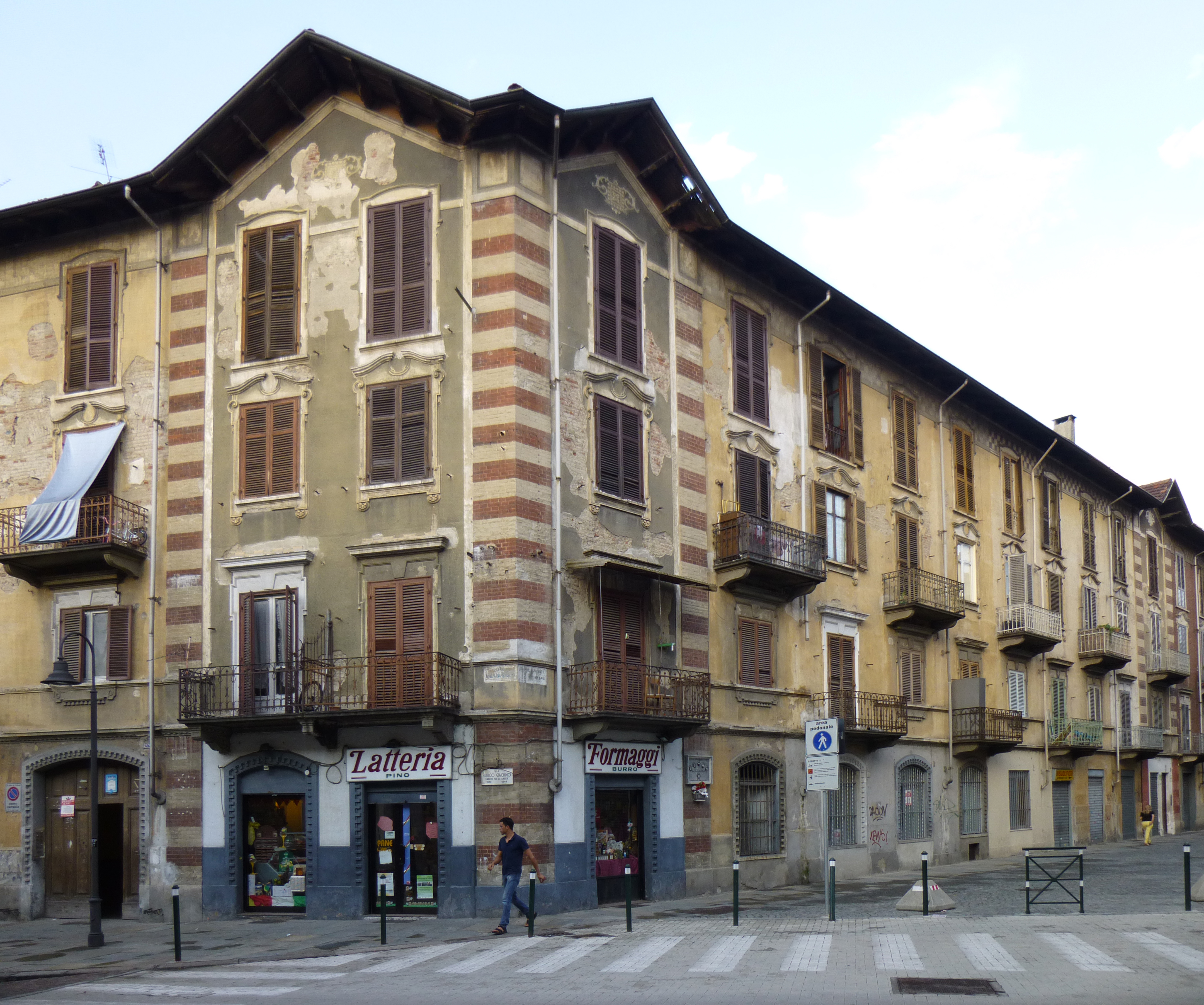 Torino, borgo Vittoria, Casa ed ex opificio Hänhel in via Giachino angolo via Gramegna.